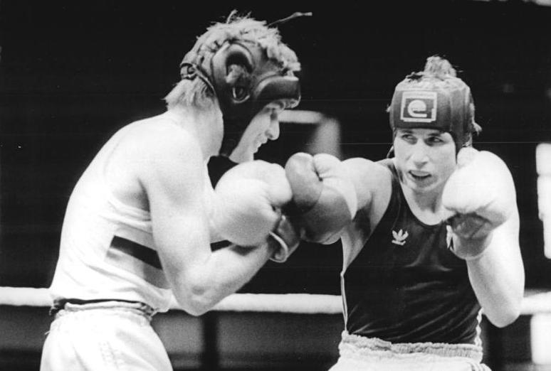 Iwan Filtschew, Rene Breitbarth ADN-ZB Lehmann 5.3.86 Halle: 15. Chemiepokal-Turnier im Boxen-Vorrunde-Im Bantamgewicht wurde der 19jährige Halbfliegengewichts-Europameister von Budapest, Rene Breitbarth (SC Traktor Schwerin-rechts), einstimmiger Punktsieger über den bulgarischen Titelträger und Europameister von 1982 Iwan Filtschew.